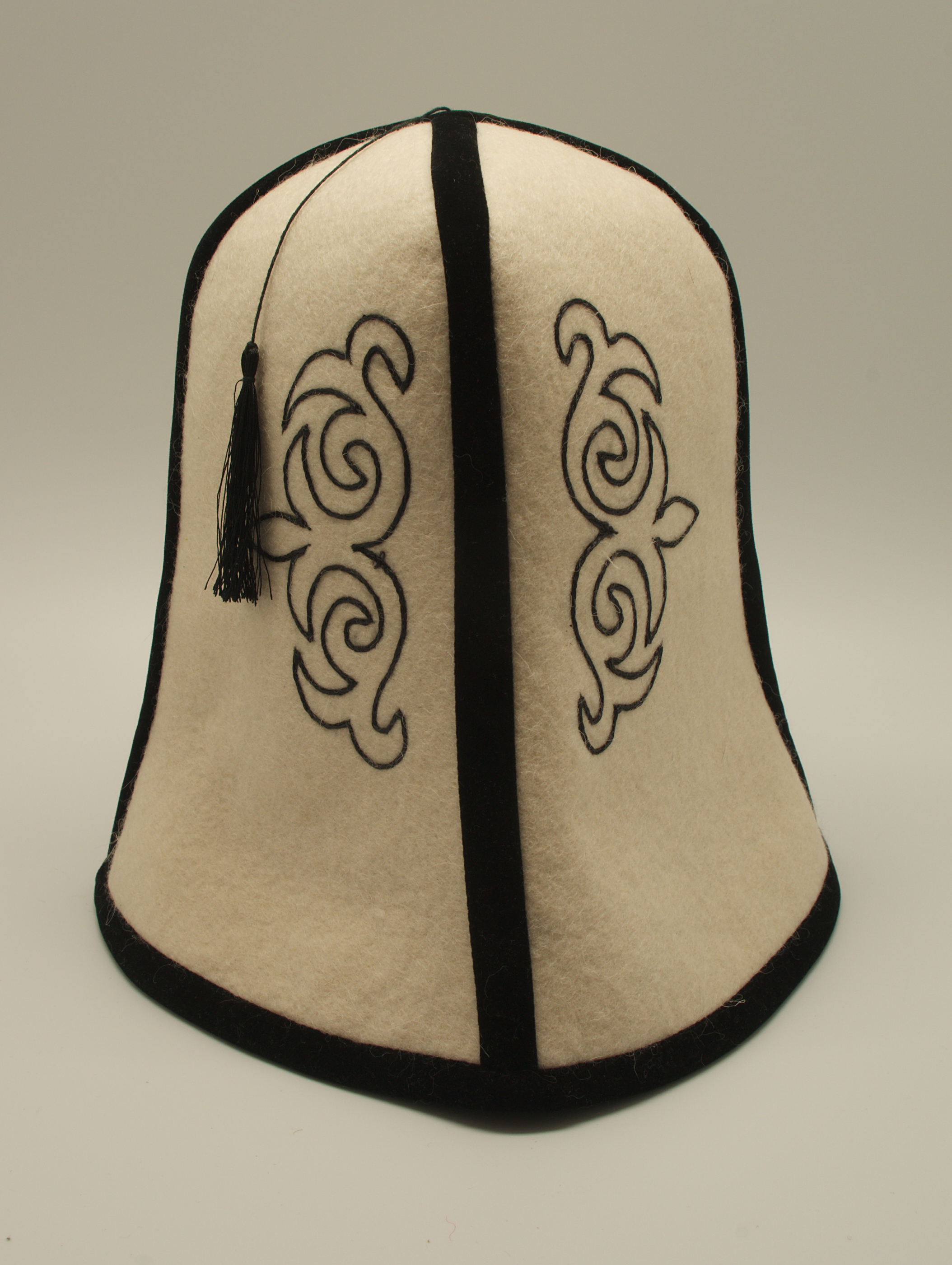 Chapeau provenant de Kirghizie